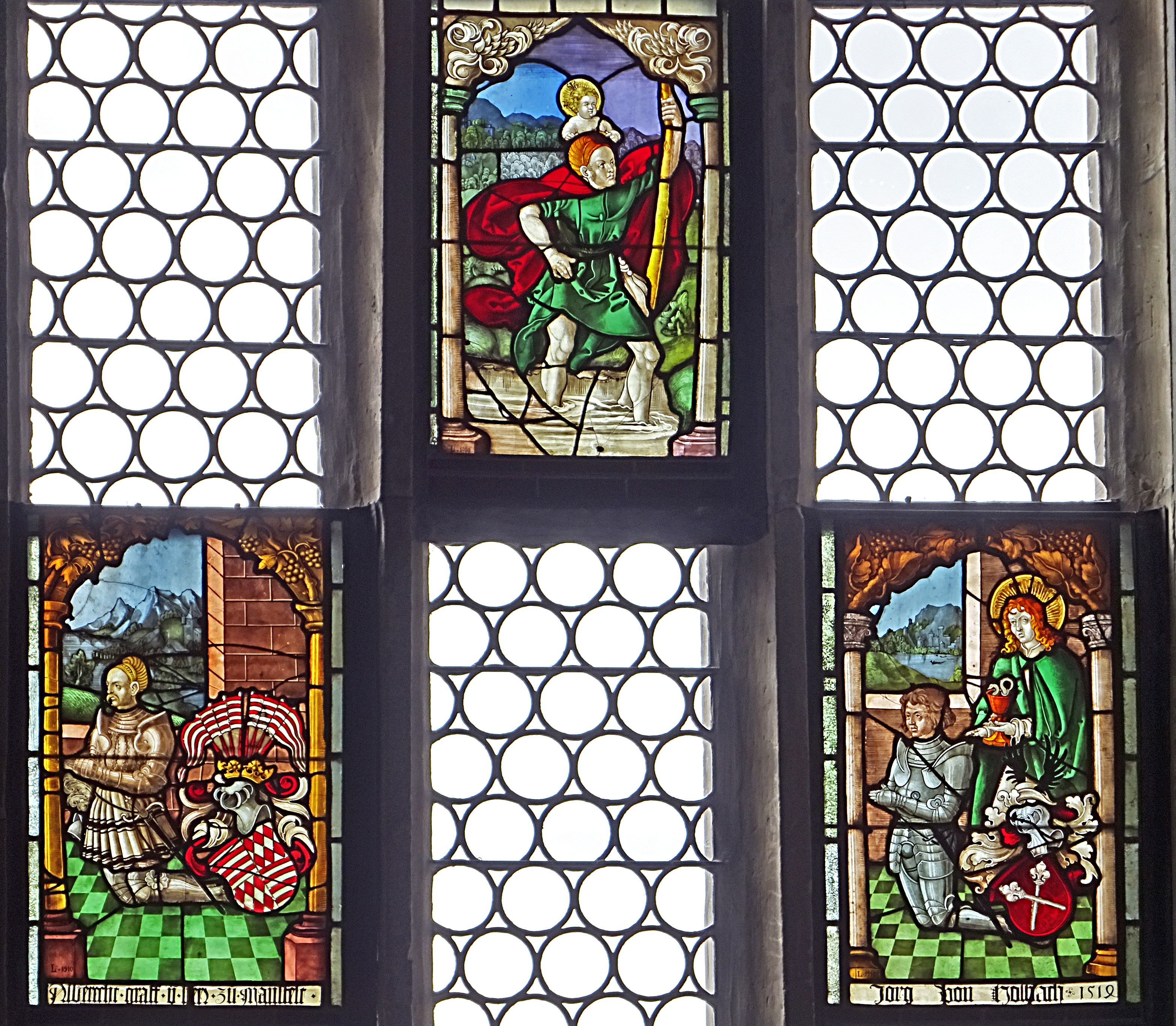 Buntglasfenster auf der Südseite der St.Annen-Kirche (Eisleben)